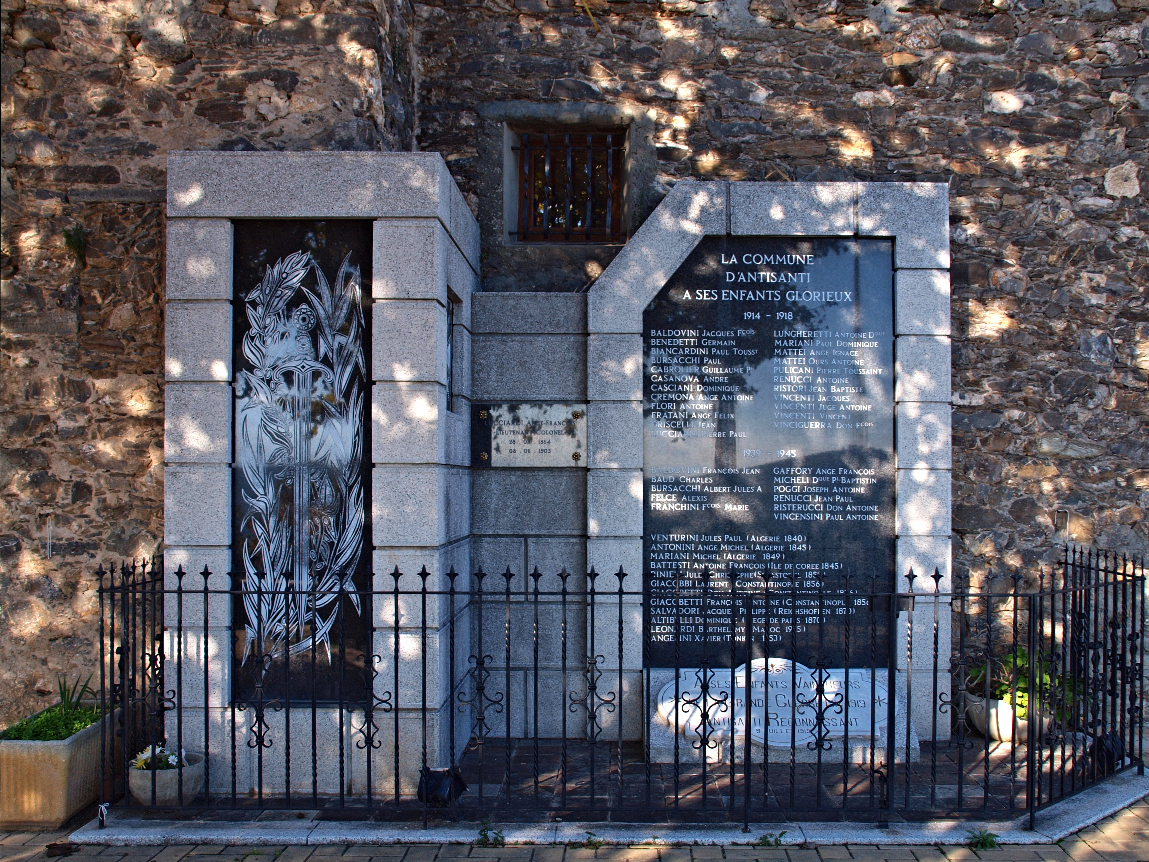 Antisanti (Corsica) - Monument aux morts sur façade de l'église paroissiale